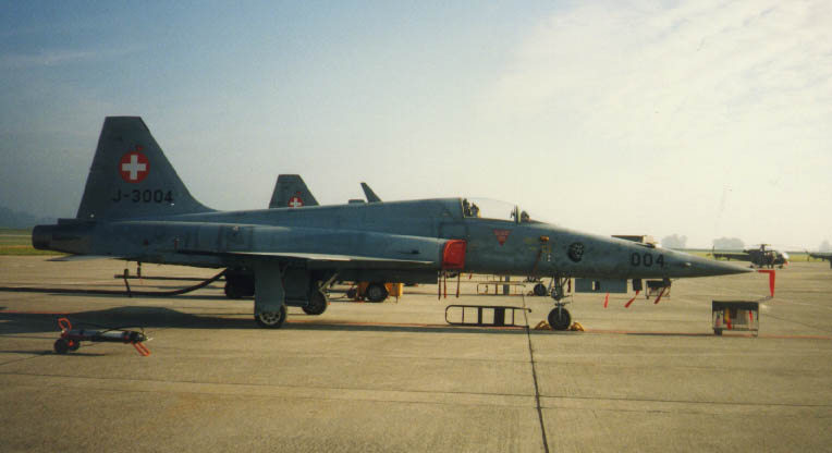 F-5E Auf der Platte SAFB Payerne